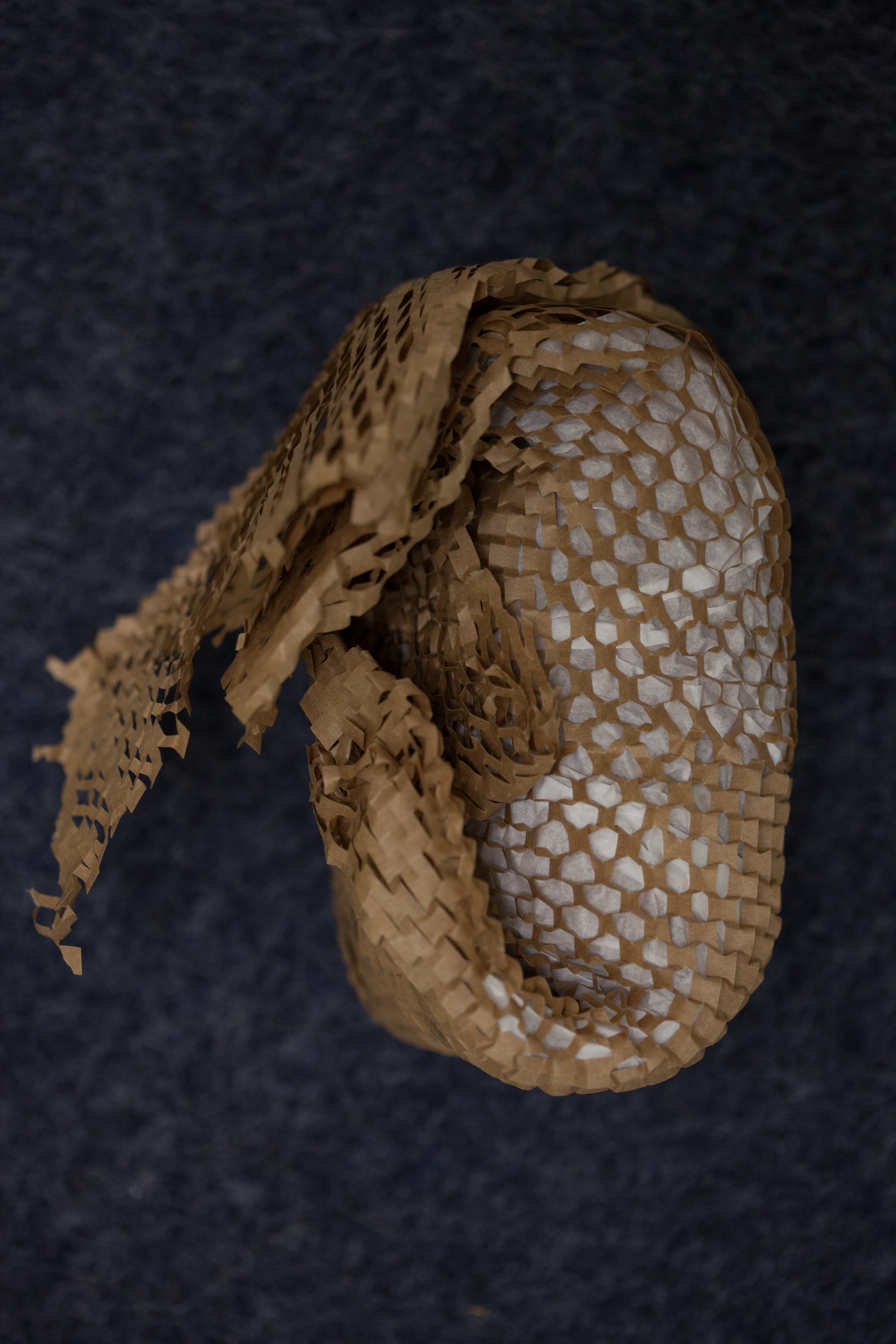 Packpapier für zerbrechliches Glas (ähnliche Schlitzung wie bei Streckeisen)